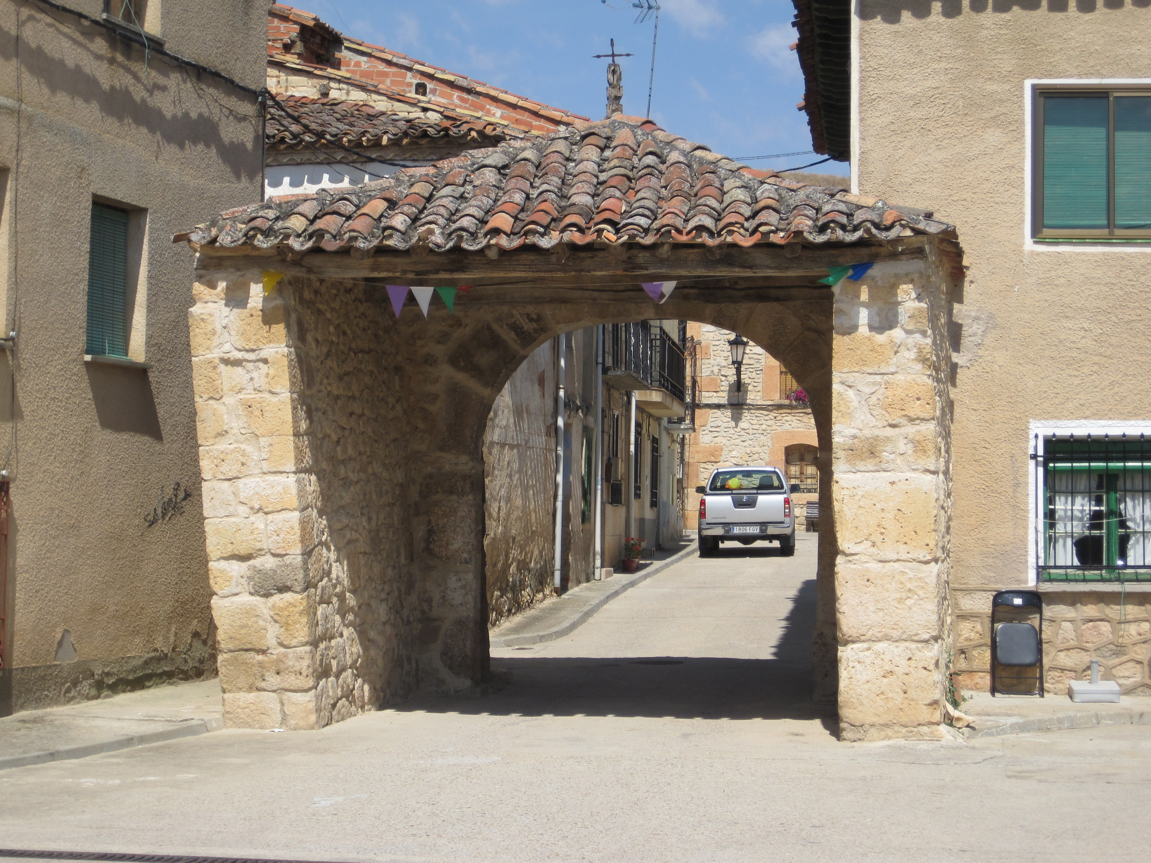 Puerta de la antigua muralla de Coruña del Conde (Burgos, España).